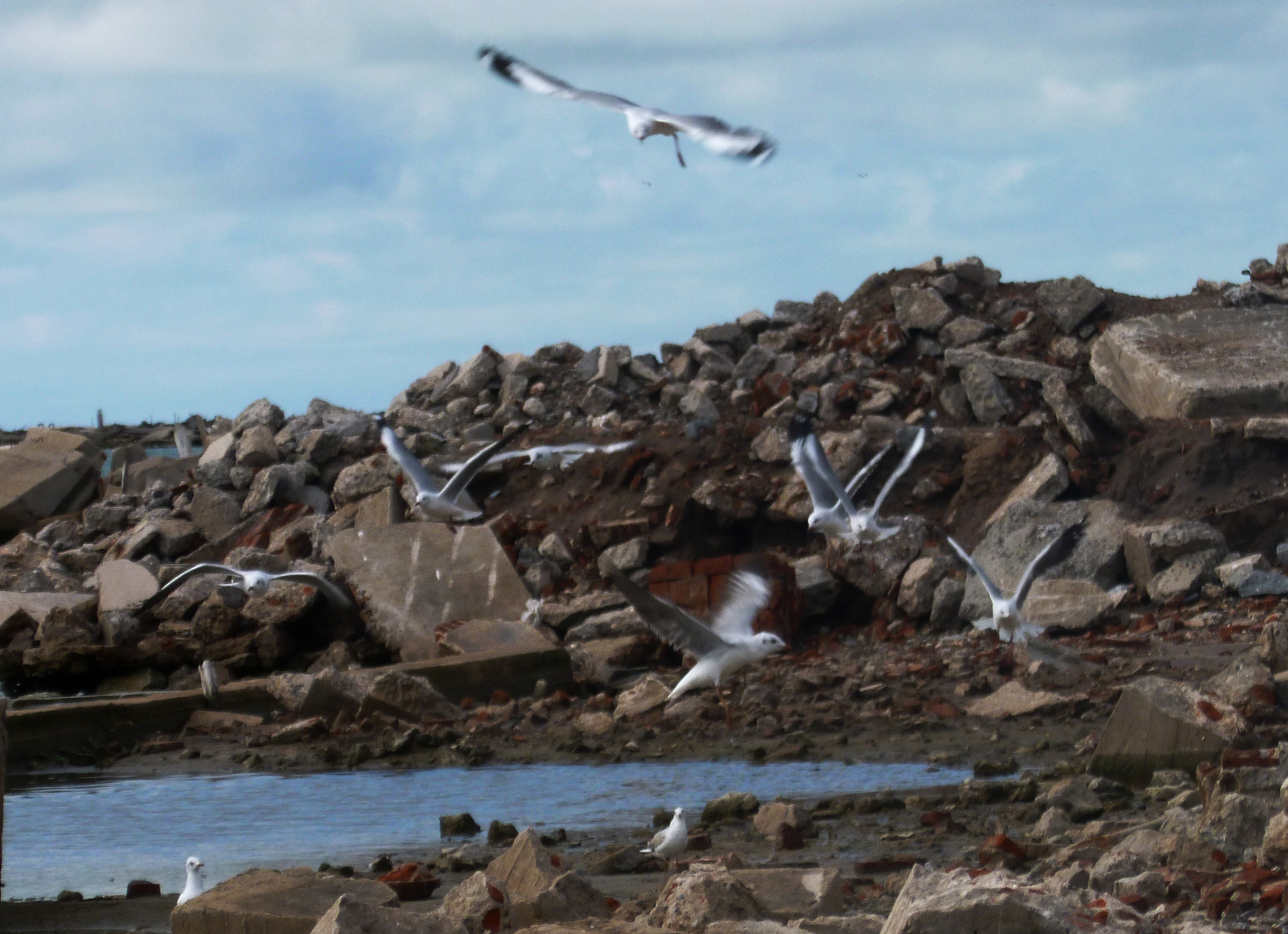 Gaviotas sobre escombros en los Bañados del Rio Dulce y Laguna Mar Chiquita(Reserva Provincial de Cordoba-Argentina_Declarada sitio Ramsar